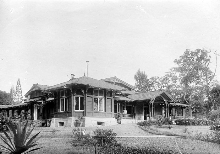 Repronegatief. Het huis van K.A.R. Bosscha, Theeonderneming Malabar